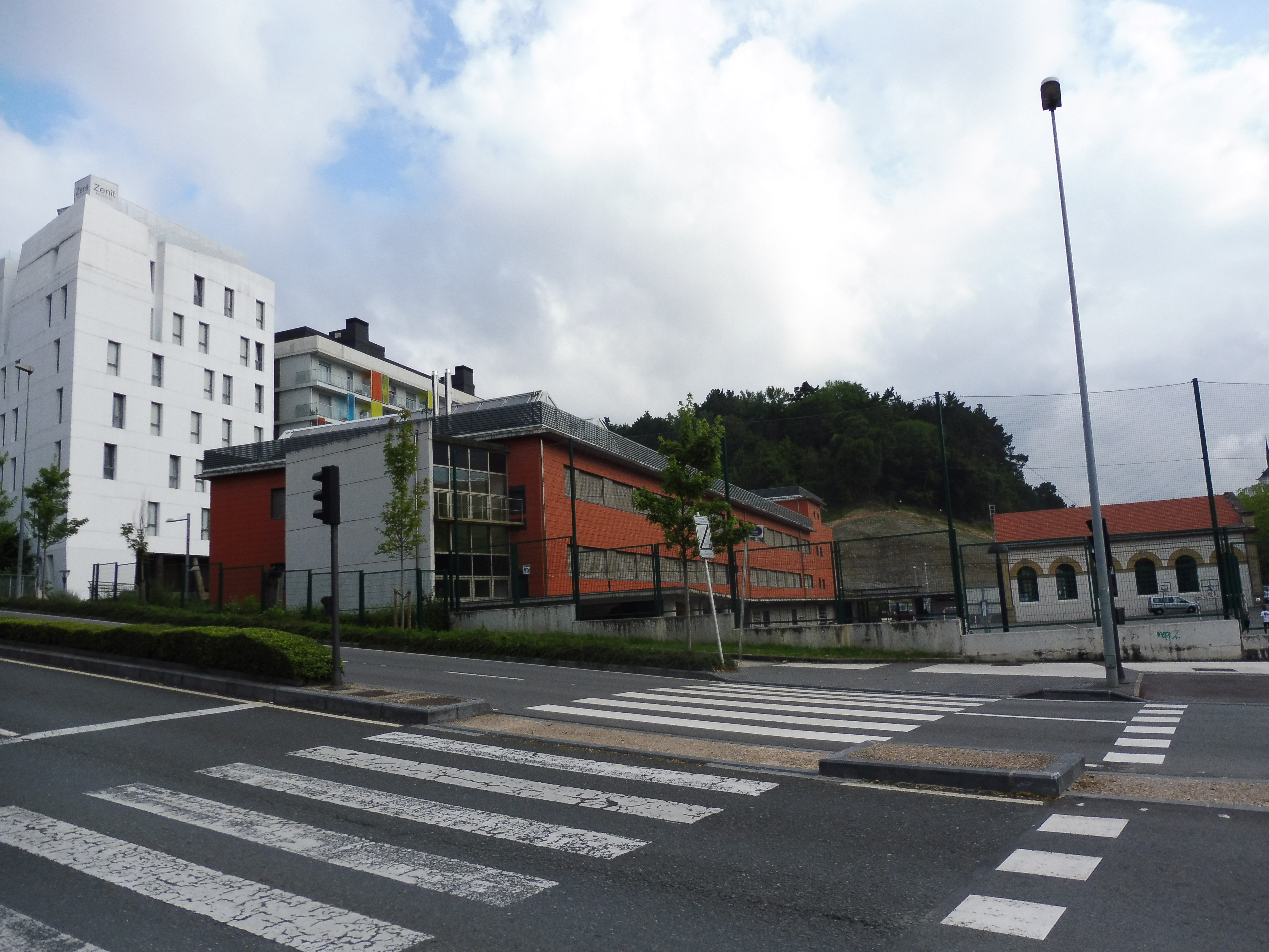 Amara Berri eskola publikoak hainbat egoitza ditu Amaran. Honakoa Morlanseko egoitza da. Argazki hau Amarauna Bildumarako egin da. Errondo pasealekua, 7, 20010 Donostia, Gipuzkoa